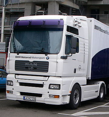 MAN TGA -(Bild vom LKW Fahrehaus bearbeitet)